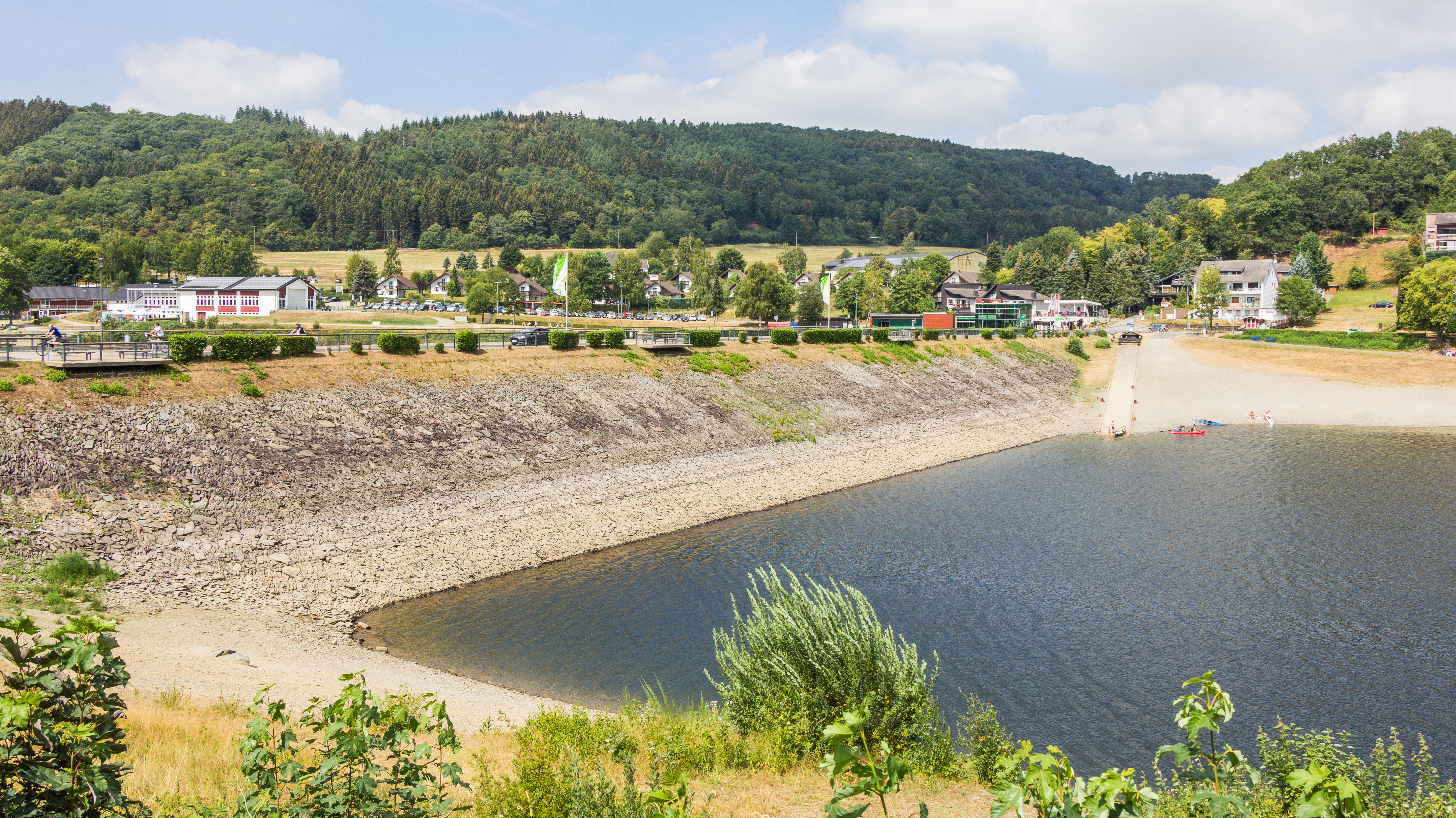 Eiserbachdamm, Rurberg - Blick von Süden mit Slipanlage der Rursee Schifffahrt